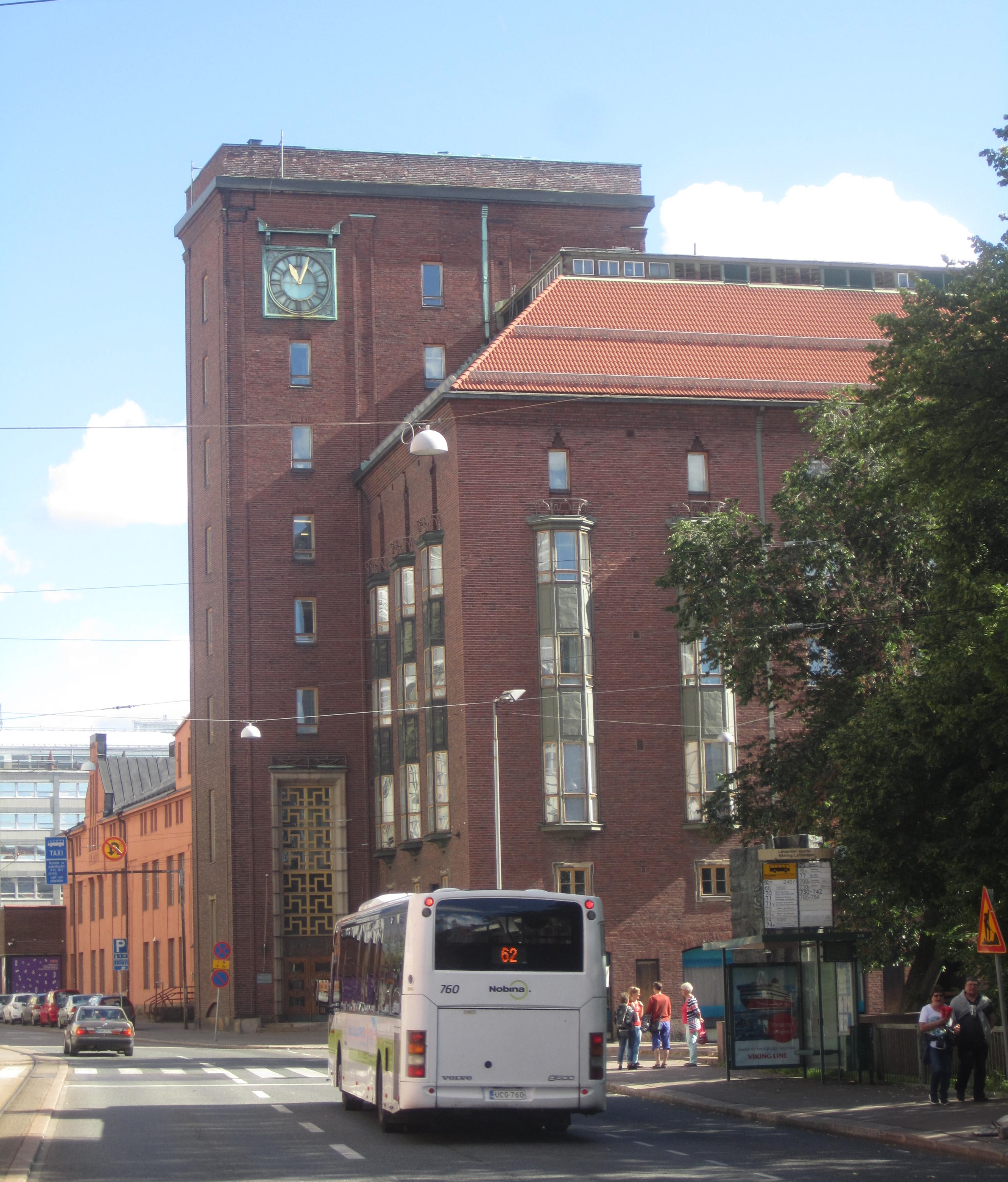 Elannon pääkonttori Helsingissä.